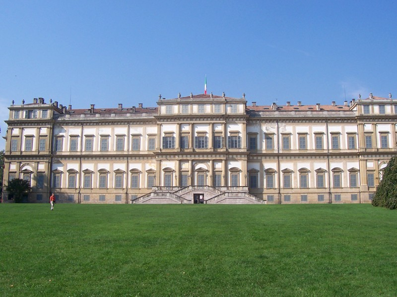 Monza - Villa Reale vista dal Parco